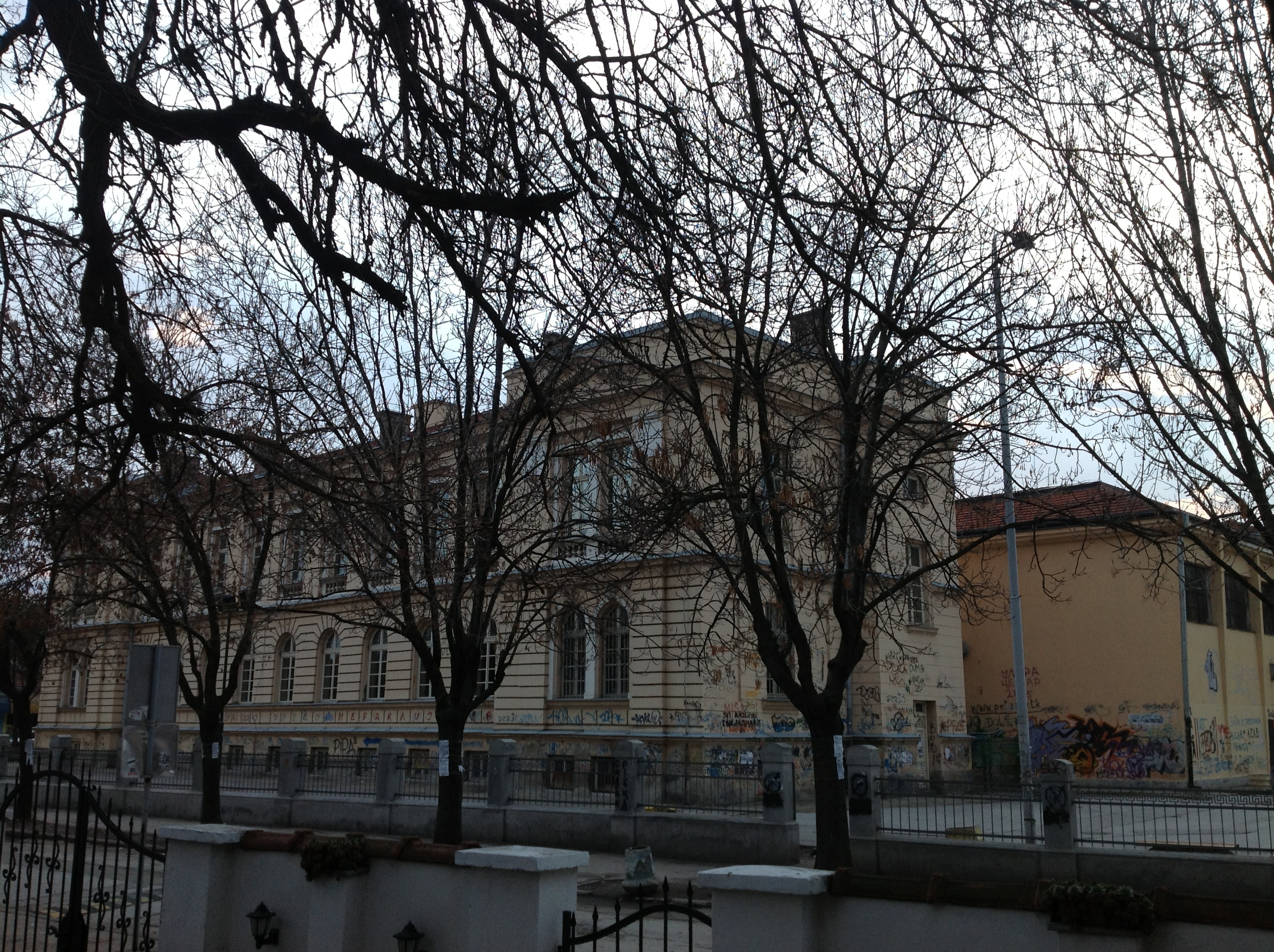 Srpski (latinica): Prva niska gimnazija Stevan Sremac u Nisu. Autor dr Milorad Dimic 13.1.2013.